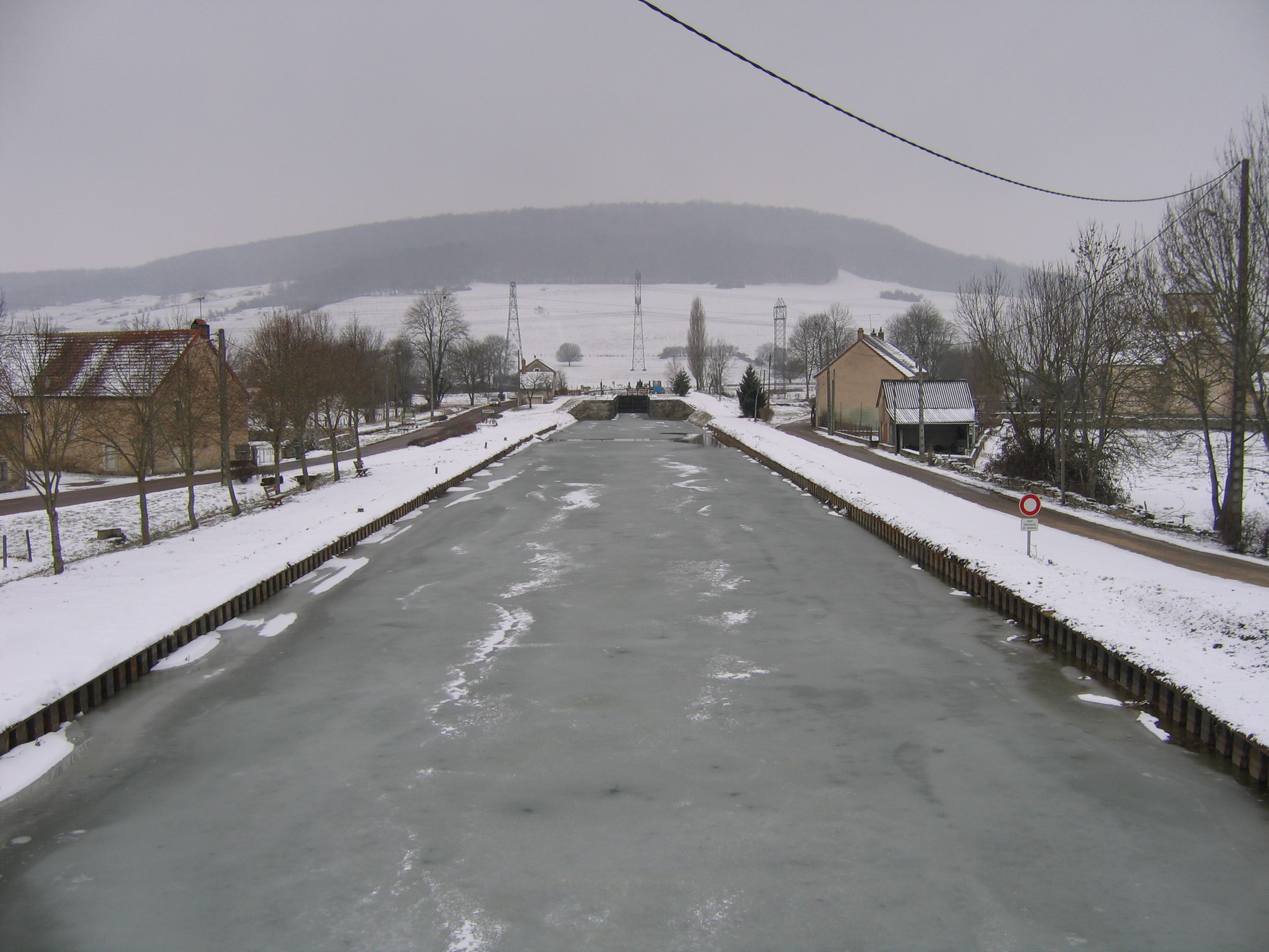 Vue sur l'écluse de Crugey du canal de Bourgogne (France), principale curiosité du village (février 2005)